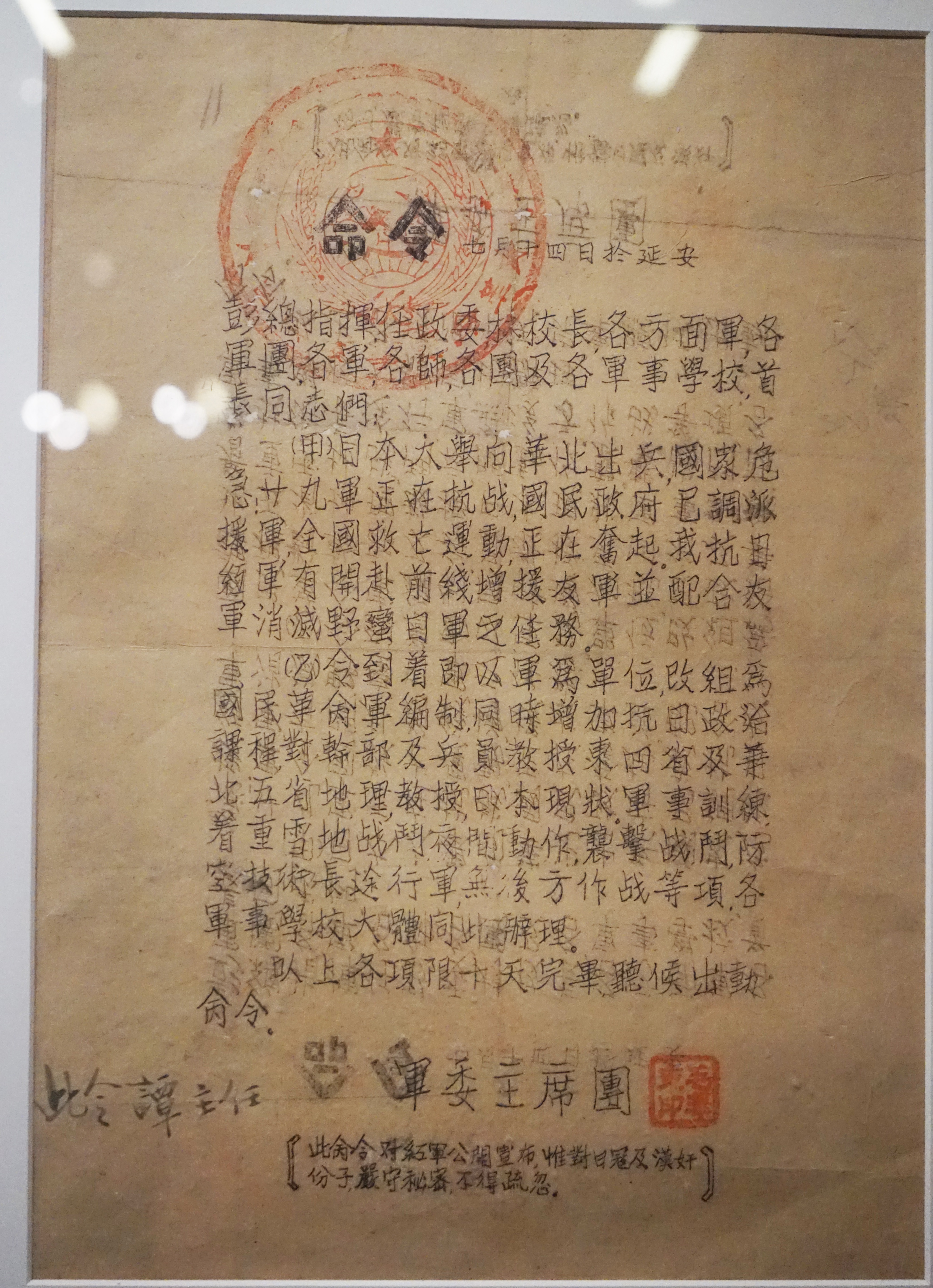 中文（中国大陆）: 1937年7月，中央军委主席团发布的关于红军以军为单位改组为国民革命军，待命开赴抗日前线的命令